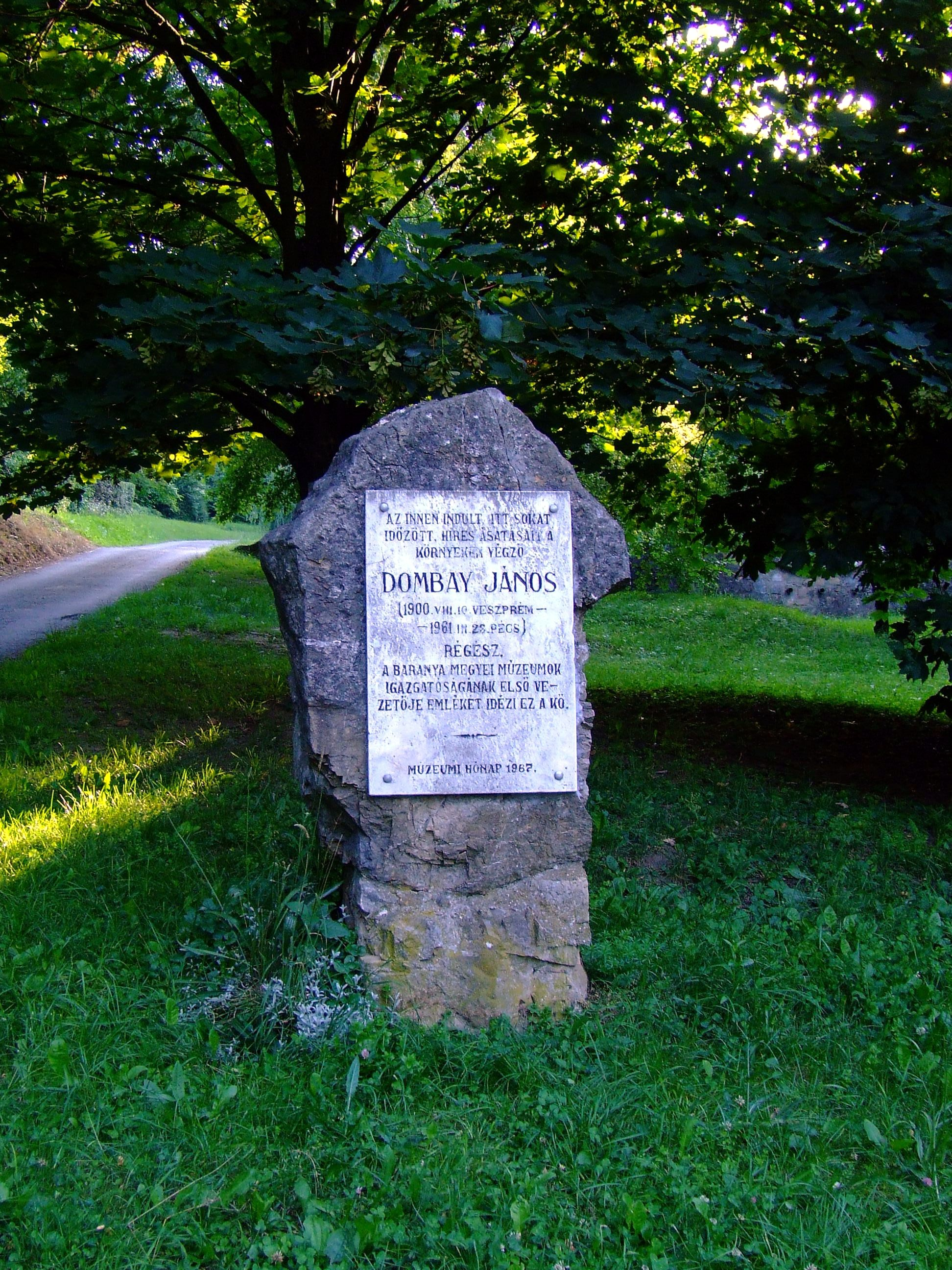 A névadó, Dombay János emléktáblája a Dombay-tó partján